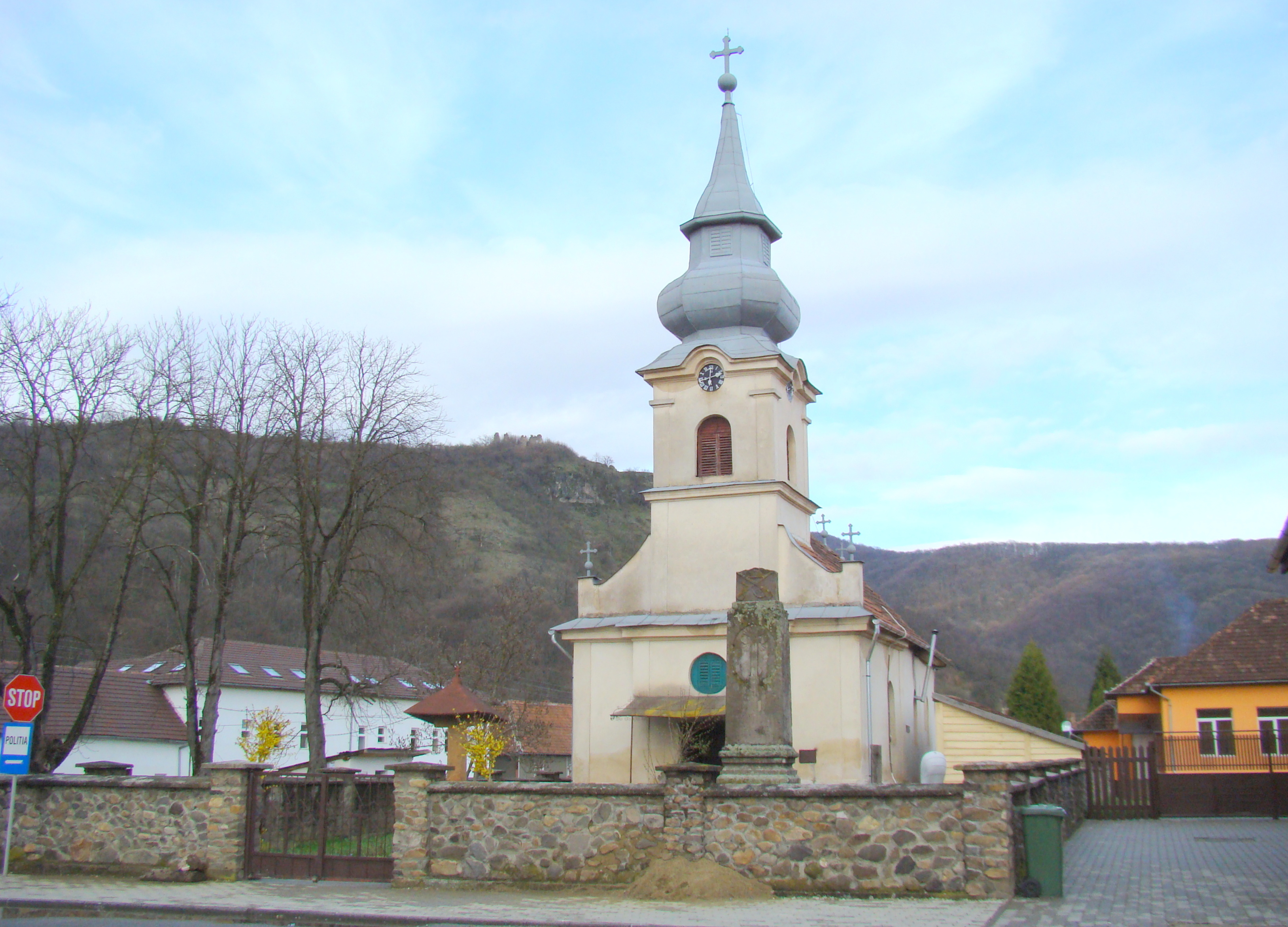 Ansamblul bisericii "Pogorârea Duhului Sfânt"